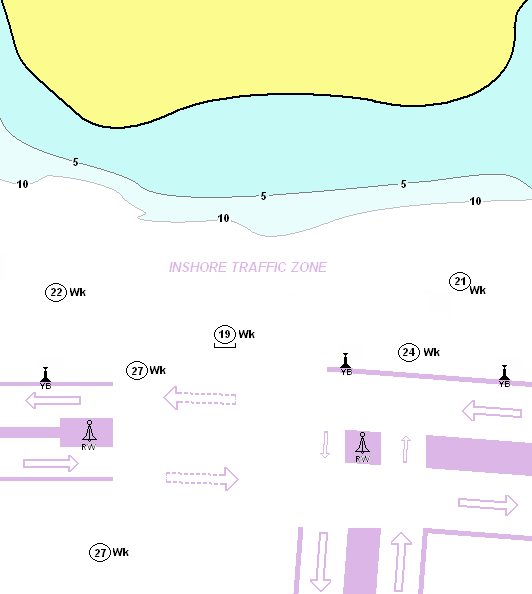 Ein Verkehrstrennungsgebiet mit eingezeichneter Küstenverkehrszone